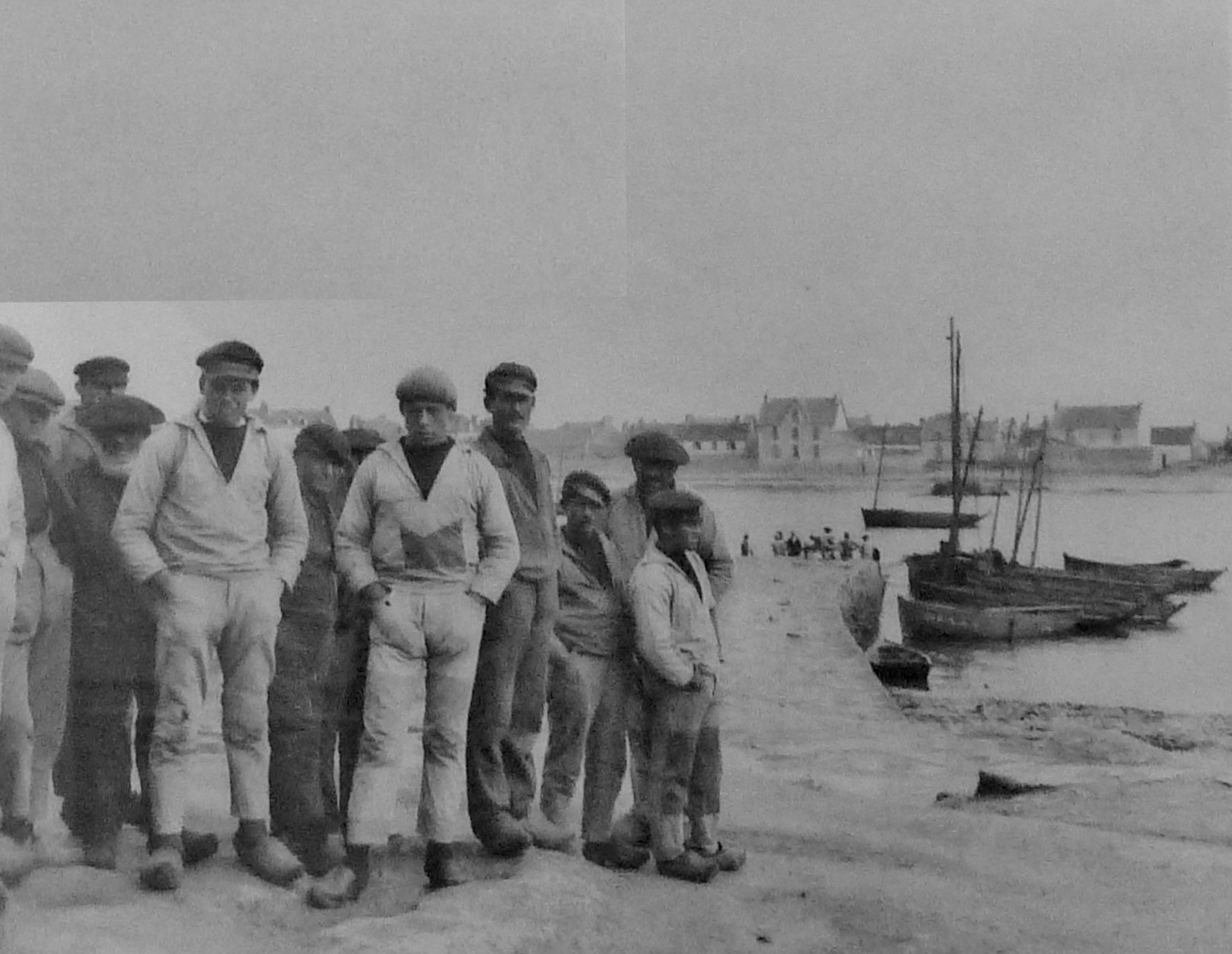 Groupe de pêcheurs sur la cale de Léchiagat vers 1920 (photographie de Jacques de Thézac)